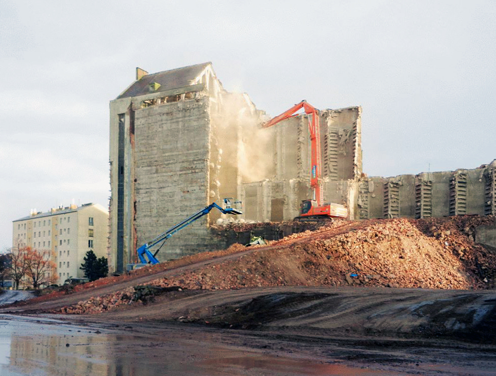 Abrissarbeiten an den Silos der Brauerei Schwechat, im Dezember 2011. (Mehrparteienwohnhaus, links: 2320 Schwechat, Brauhausstraße 9)